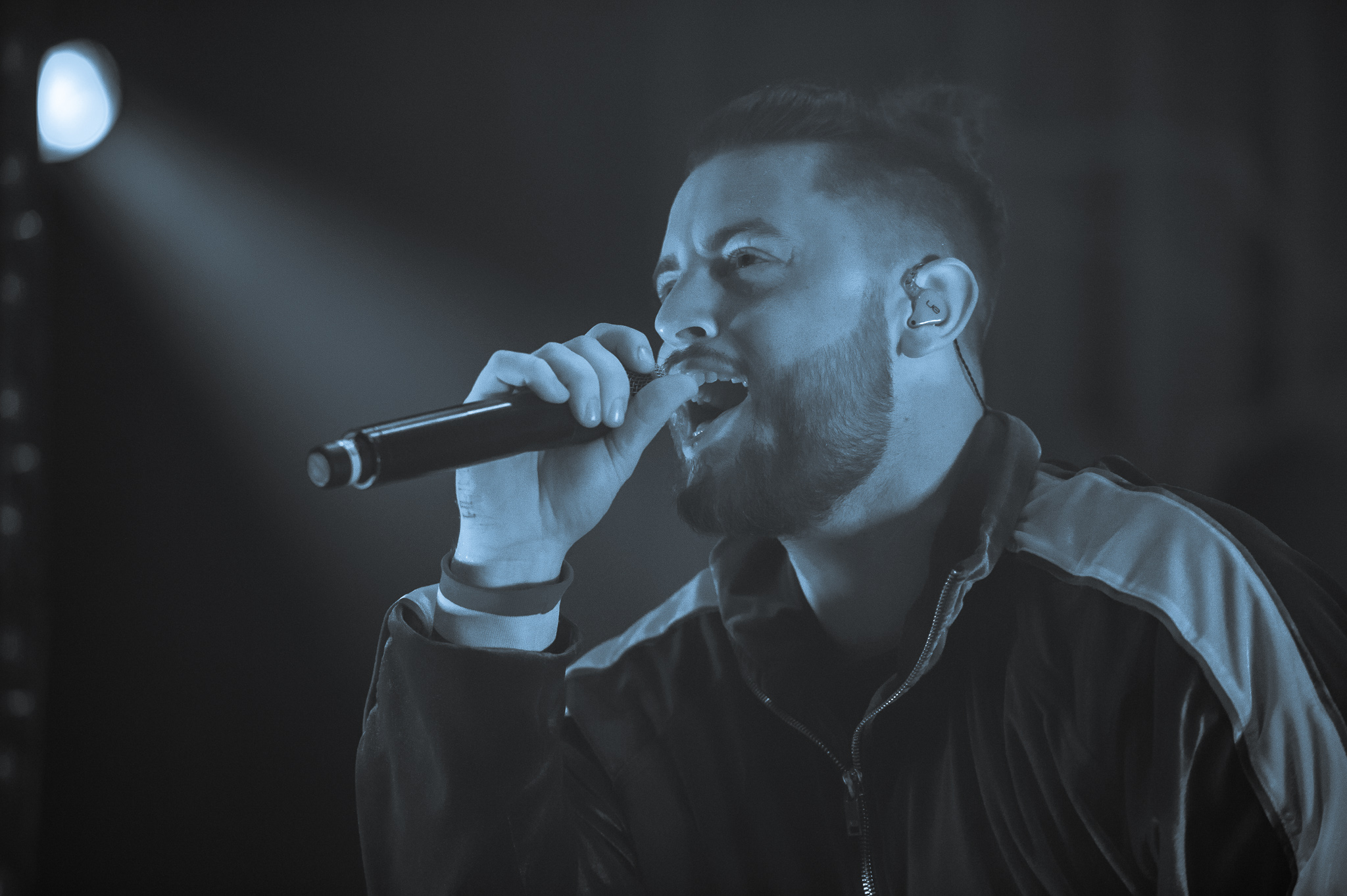 Bausa,Concertbüro Franken,Julian Otto,Konzert,Livekonzert,Livemusik,Löwensaal,Musik